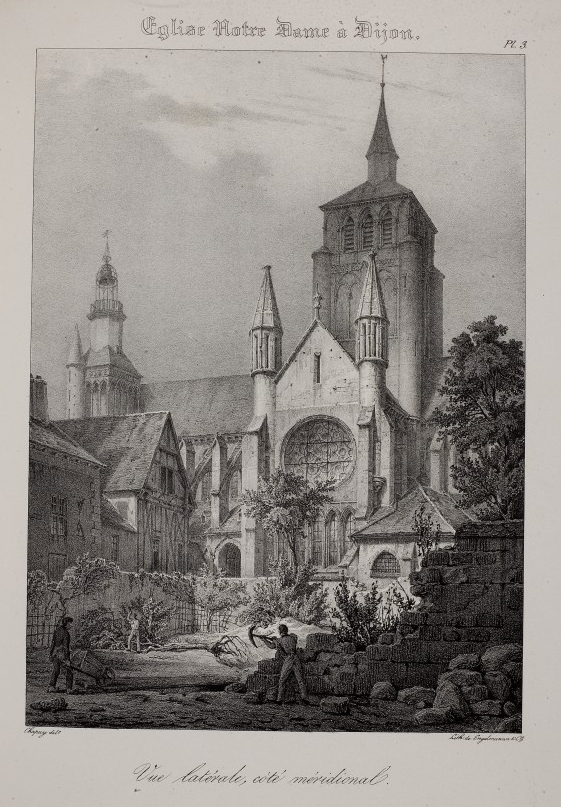 Dijon, Notre-Dame (Südansicht)